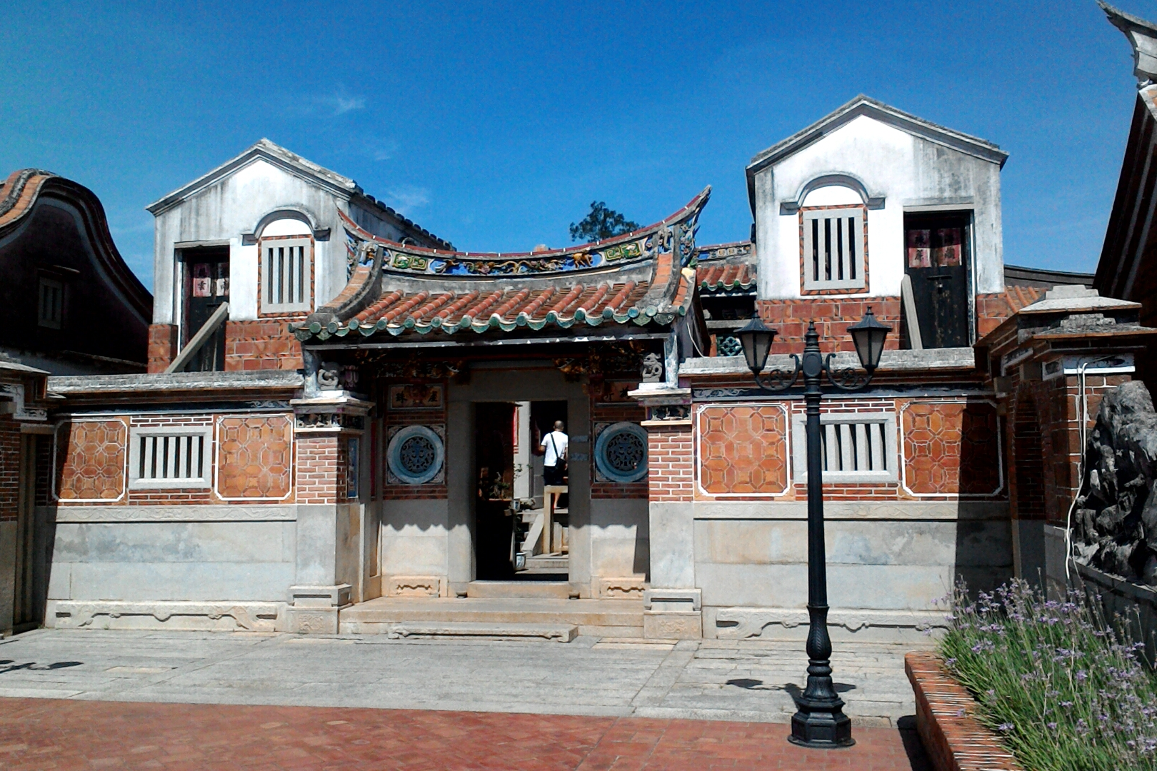 山后聚落海珠堂,福建省金門縣金沙鎮三山里